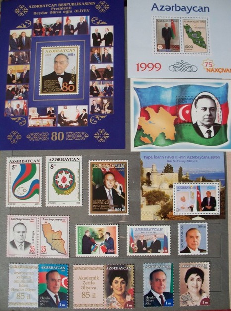 Марки современного Азербайджана